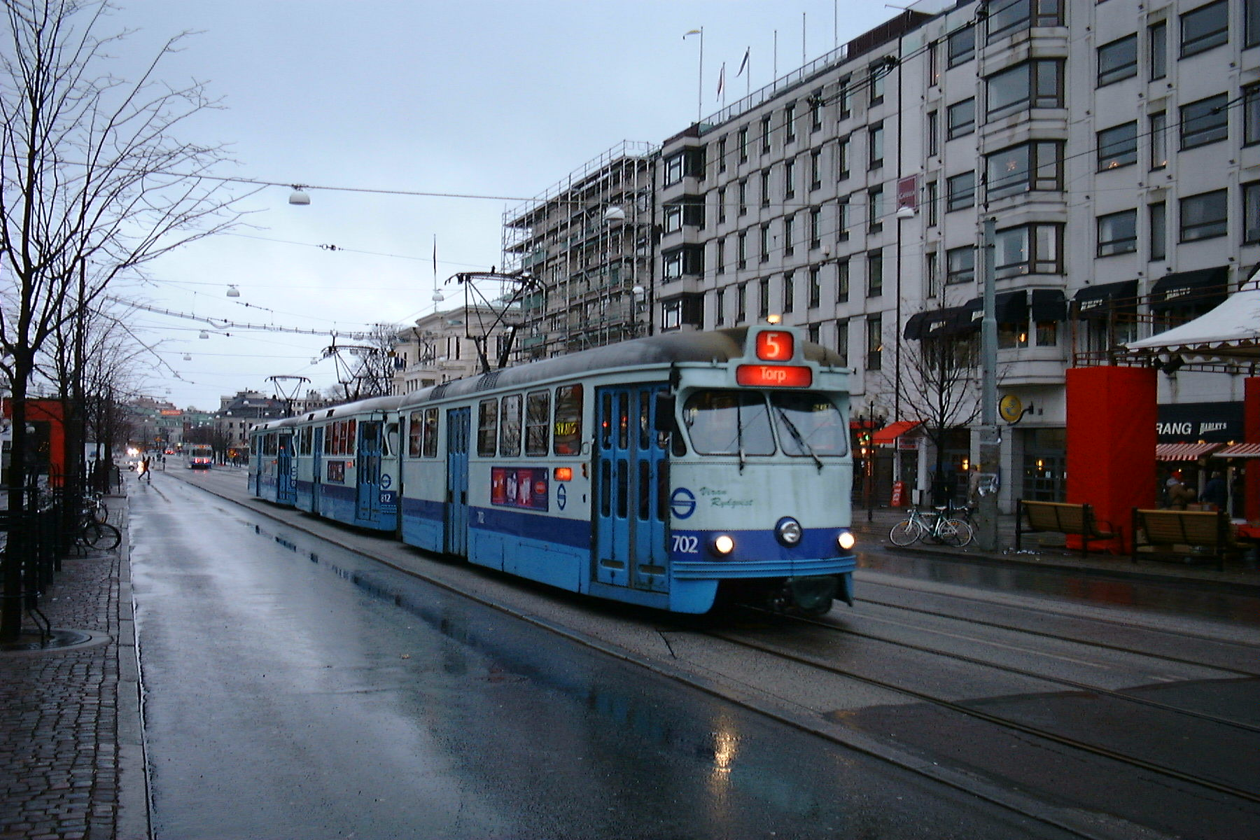 Tram 1261 in Göteborg, Sweden.jpg